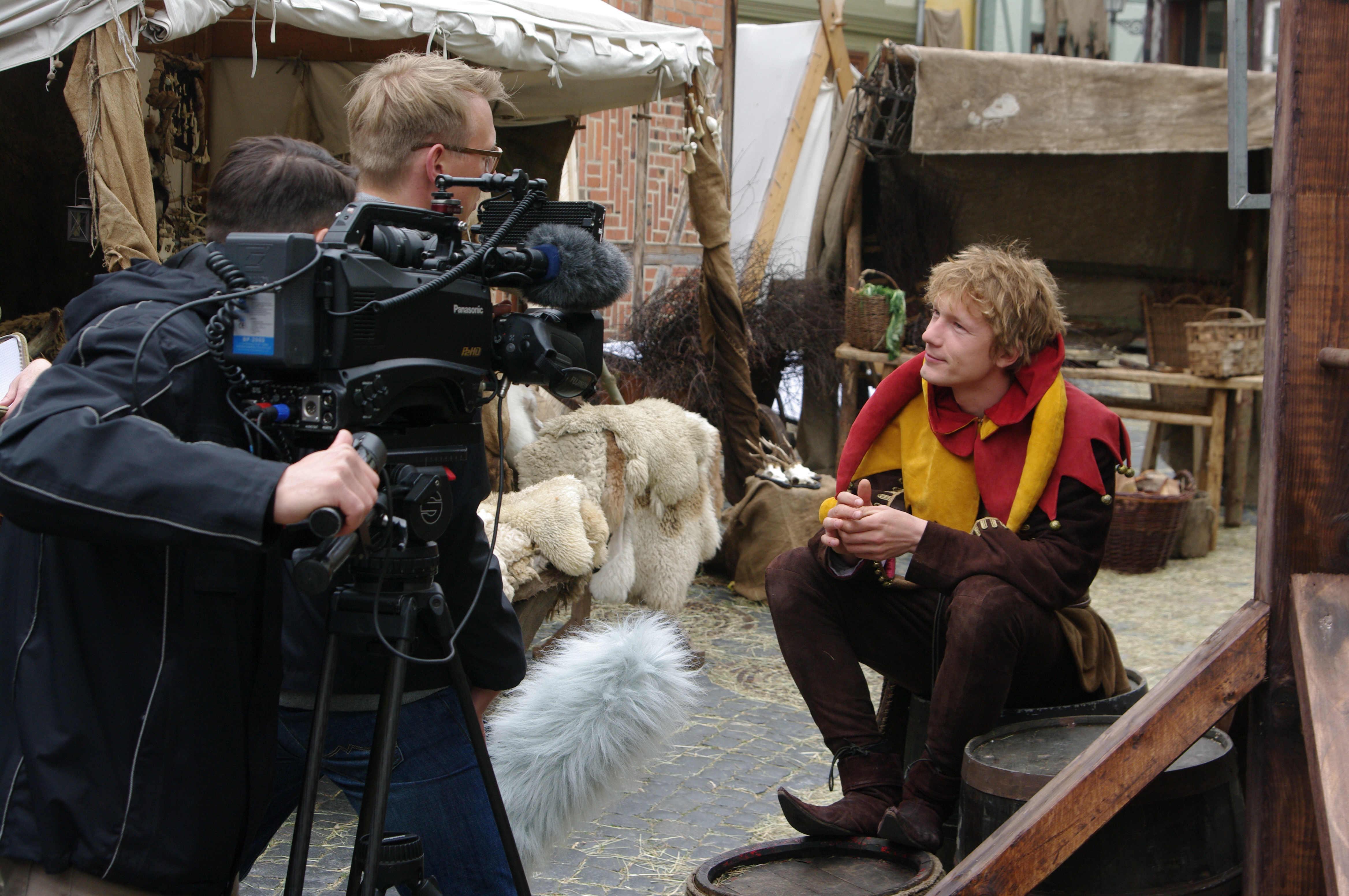 Dreharbeiten zu TILL EULENSPIEGEL 15. Mai 2014 in Quedlinburg